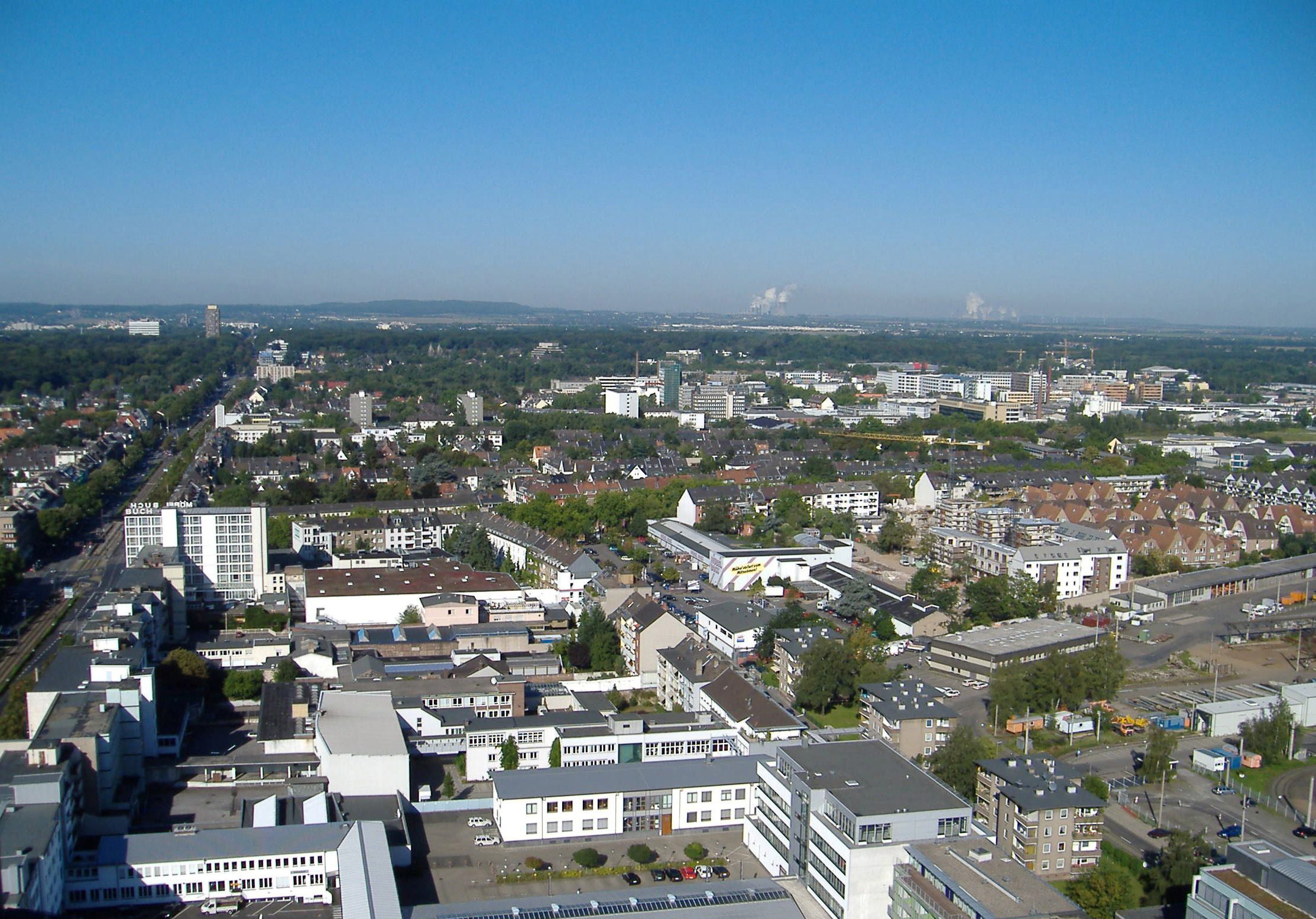 Koeln-Braunsfeld, Blick über die Stadtteile Braunsfeld, Müngersdorf - Junkersdorf